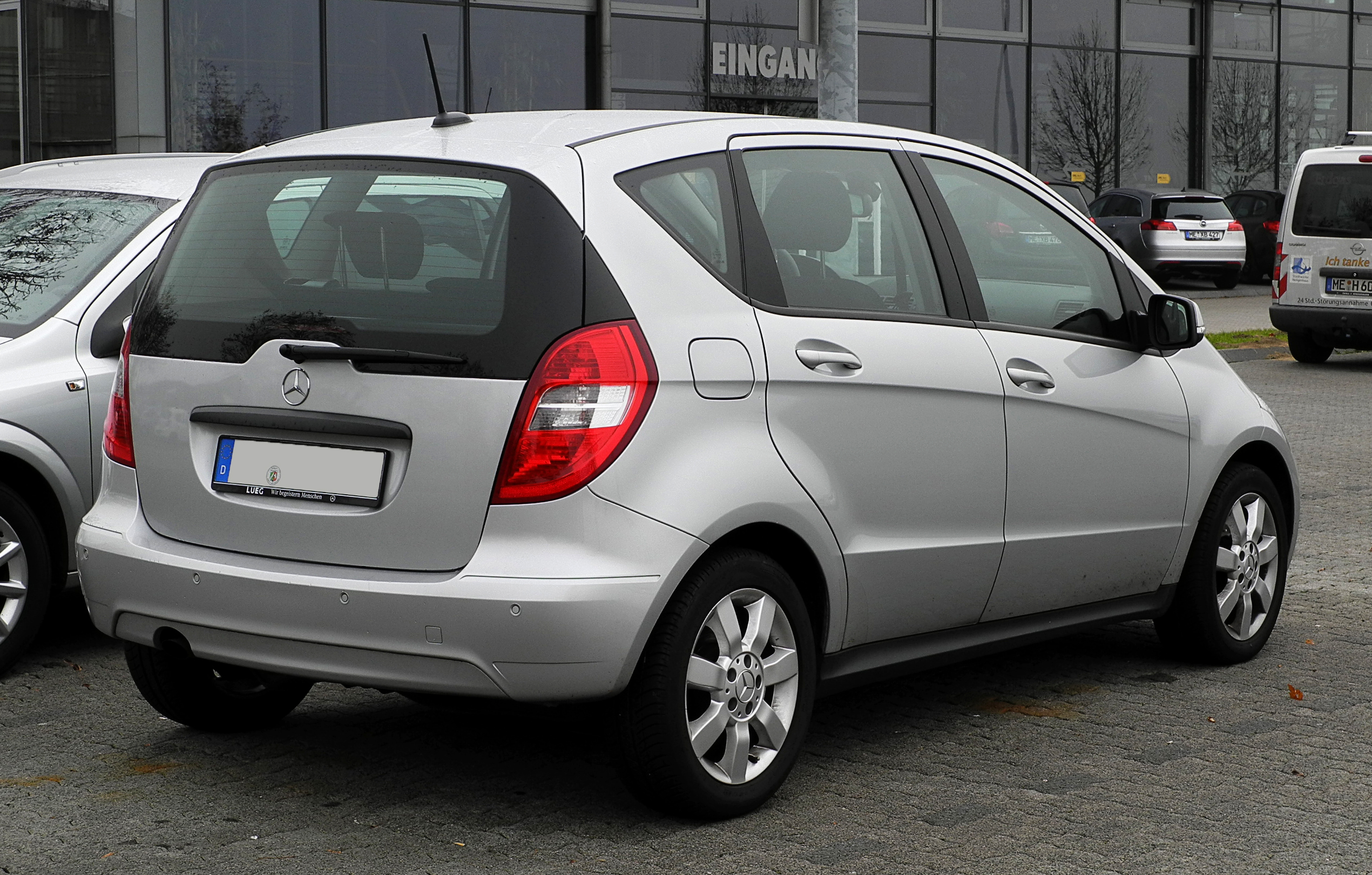 Mercedes-Benz A 160 BlueEFFICIENCY Serienausstattung (W 169, Facelift)